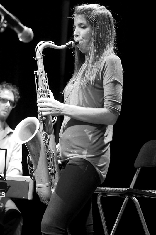 po150818 (73)-800